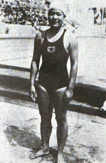 200m平泳ぎ2位 前畑 1位デニス オーストラリア